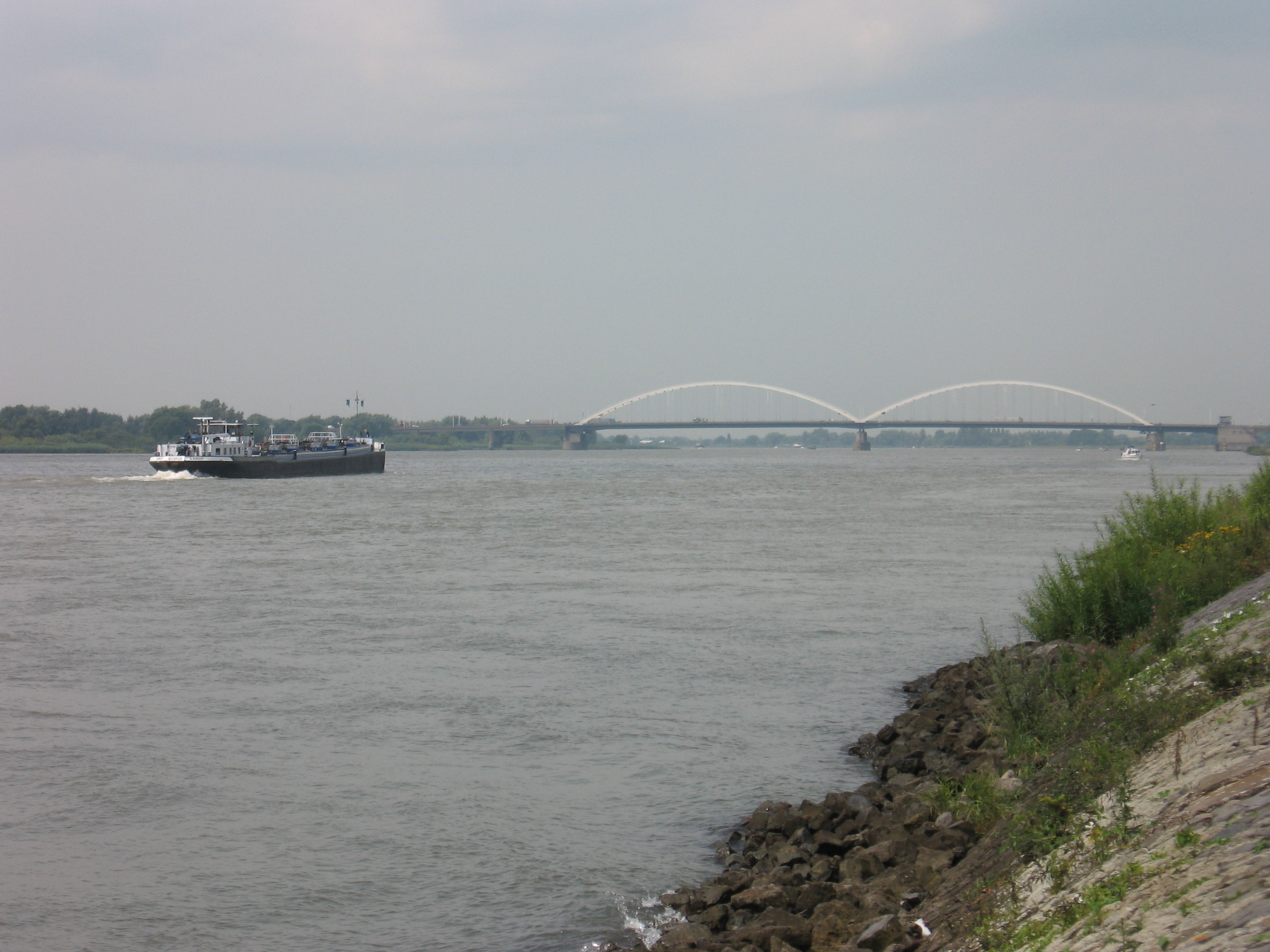 Gorinchem, Merwedebrug